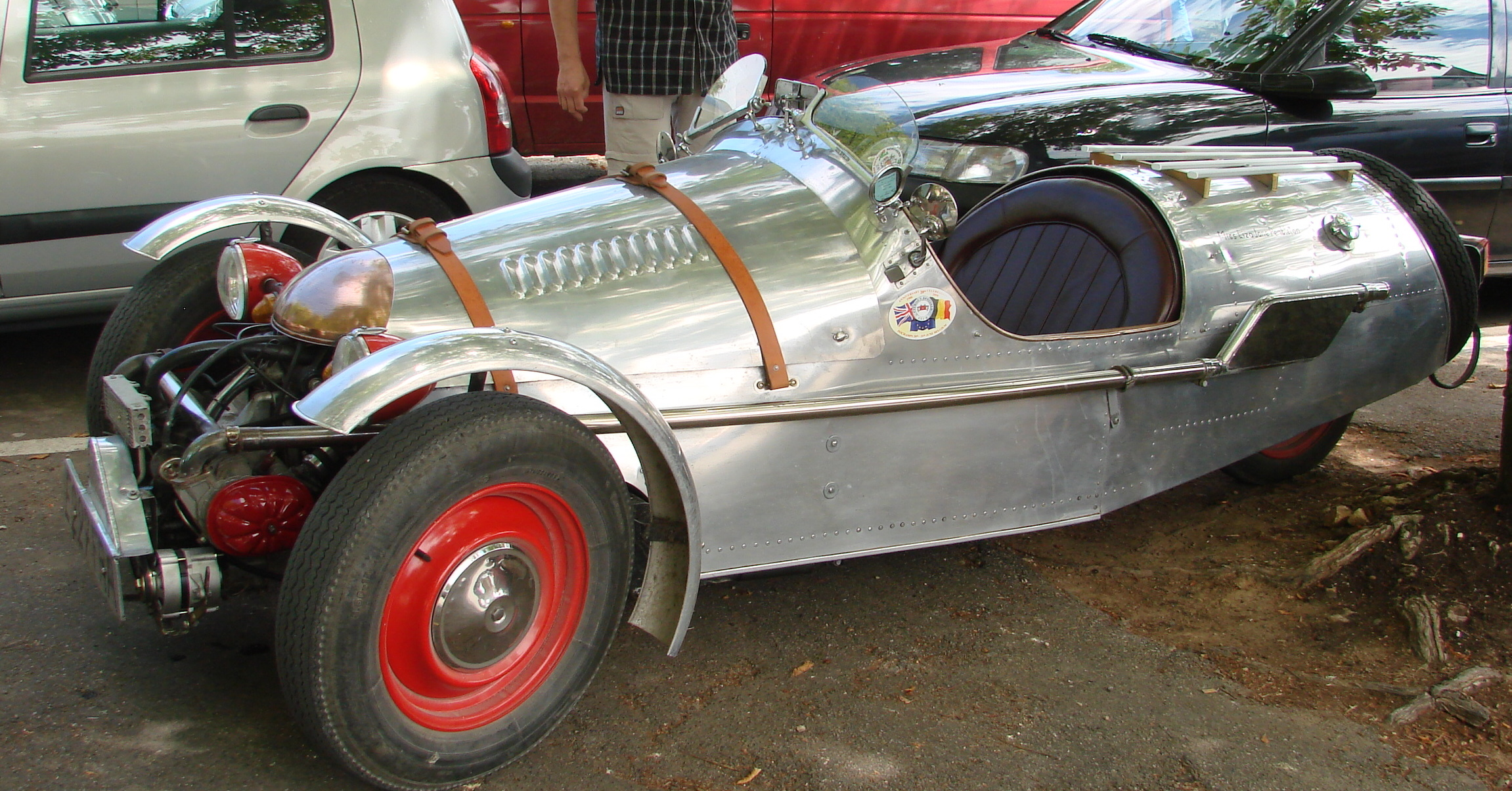 Pembleton three wheeler. 2CV based kit car.